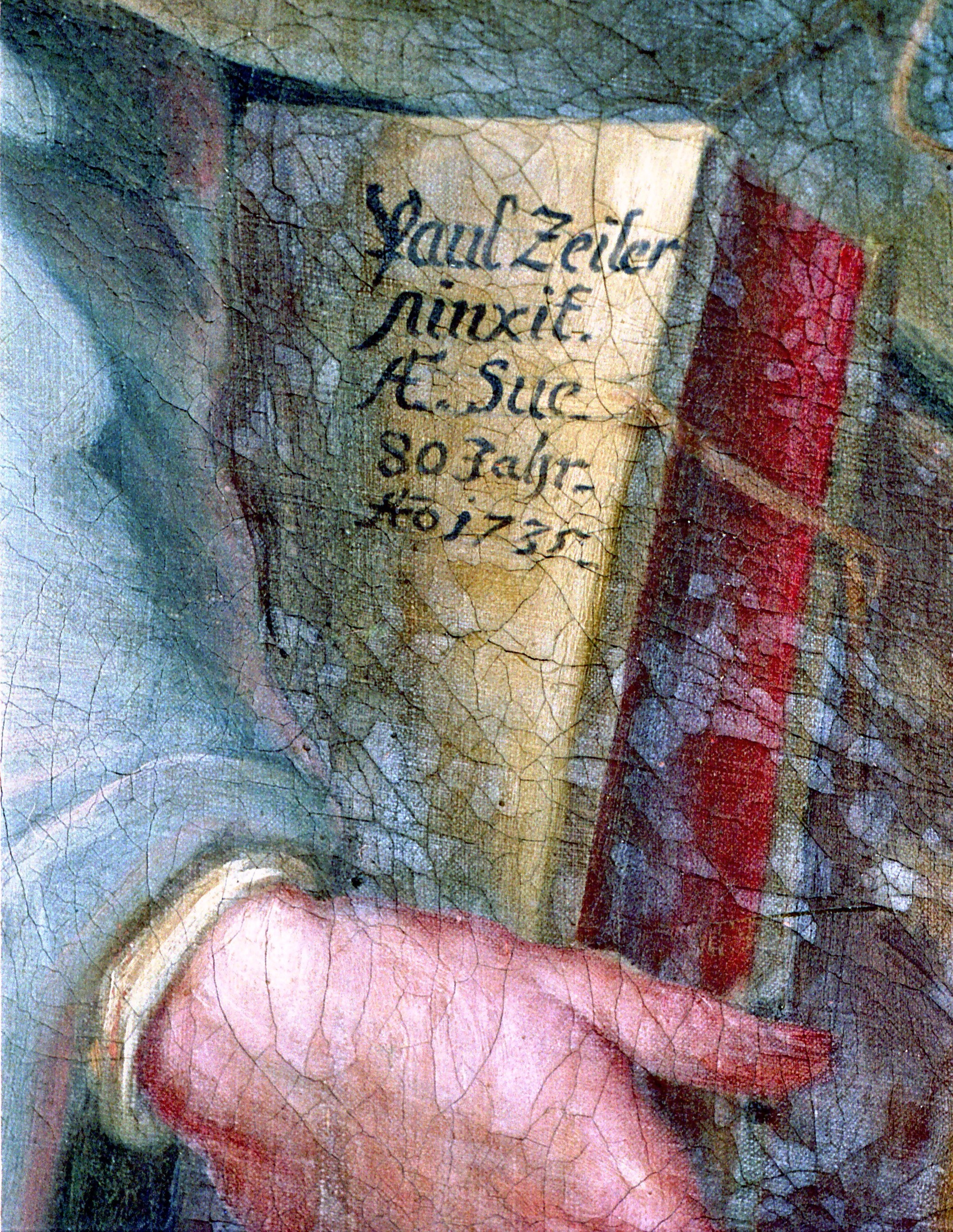 Signatur des Paul Zeiller auf einem Bild in der Pfarrkirche von Berwang